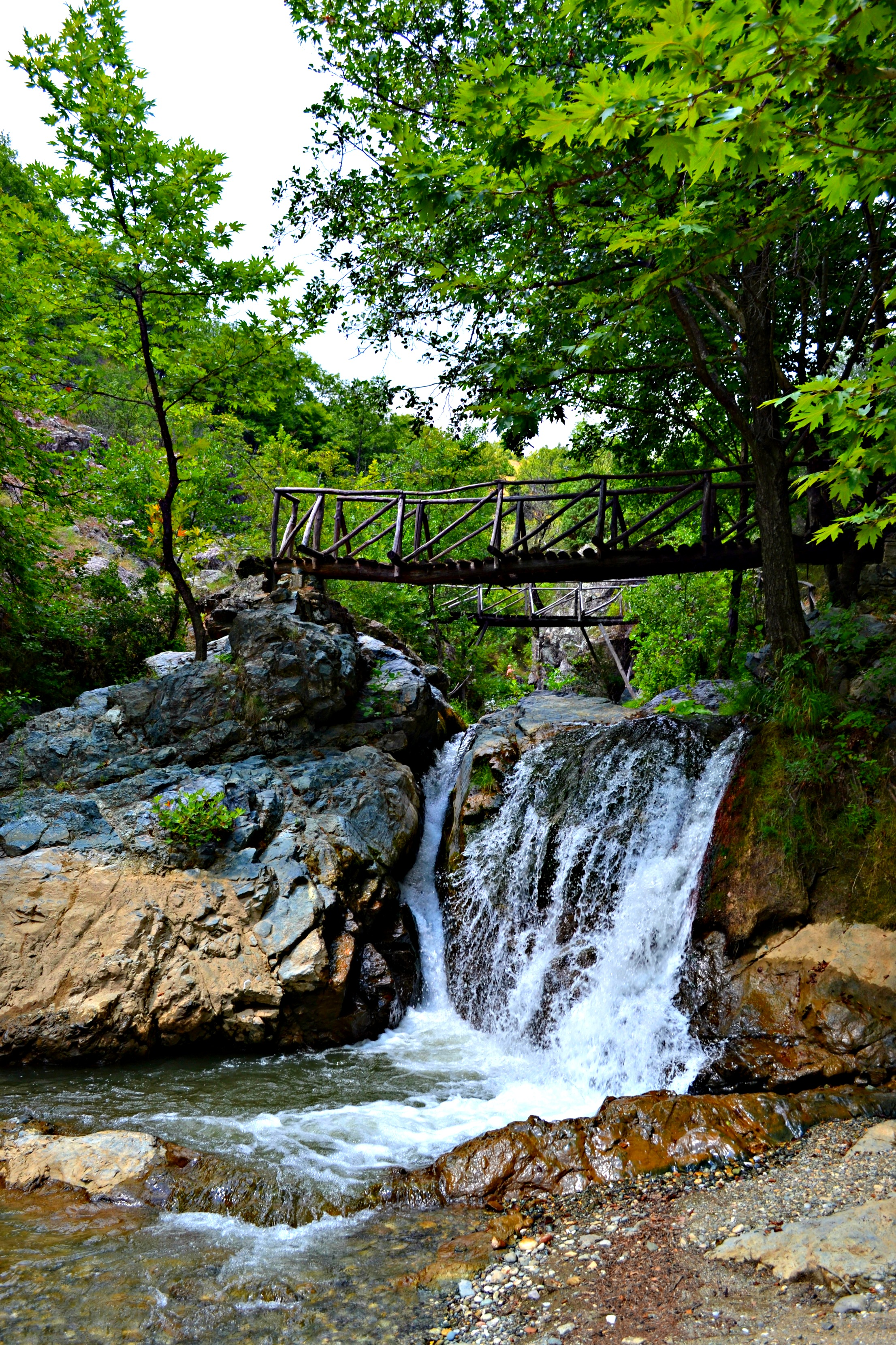 Το πλατανοδάσος στη Γουμένισσα.